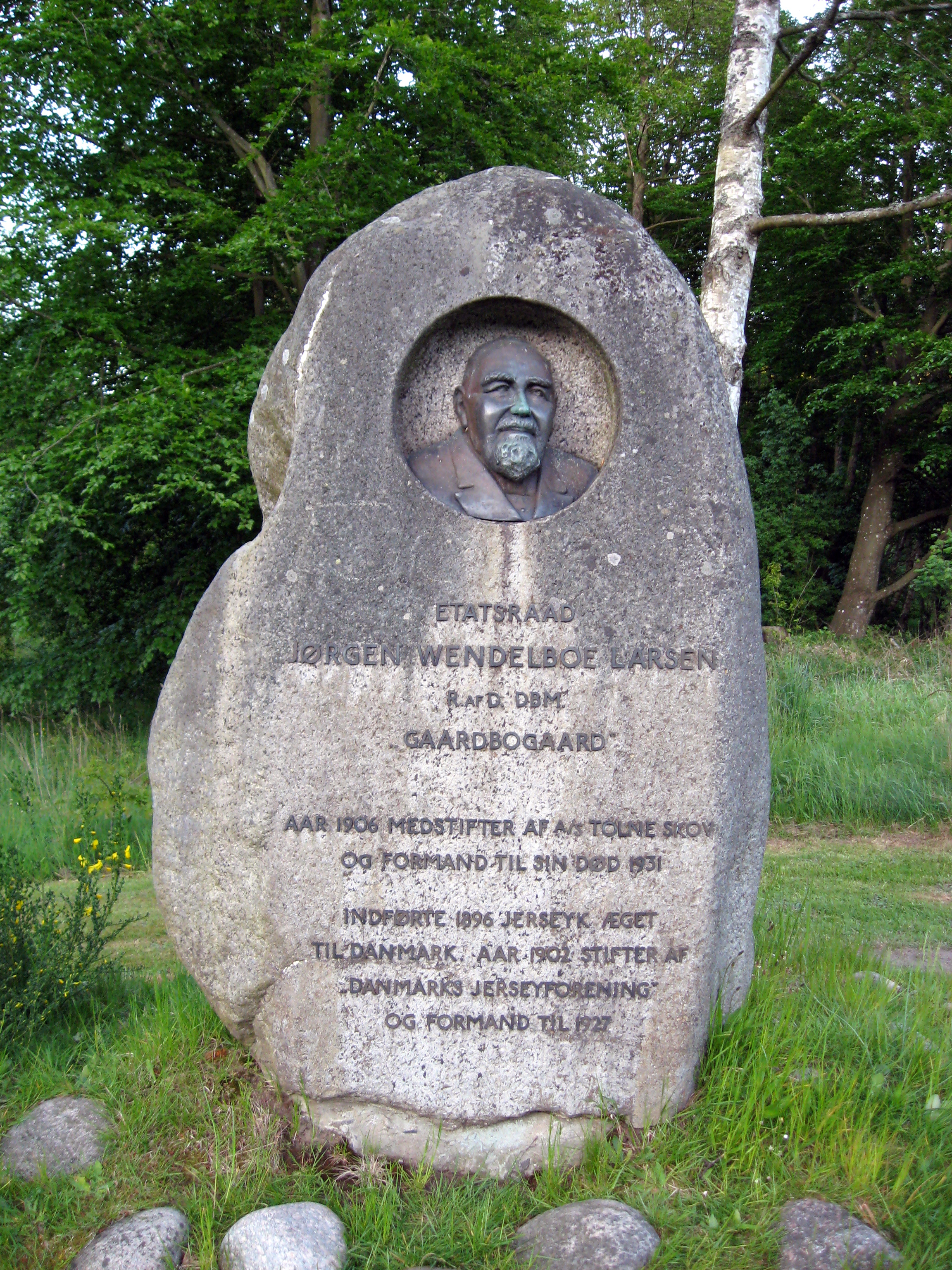 Medstifter af Tolne Skov, Jørgen Wendelboe Larsen